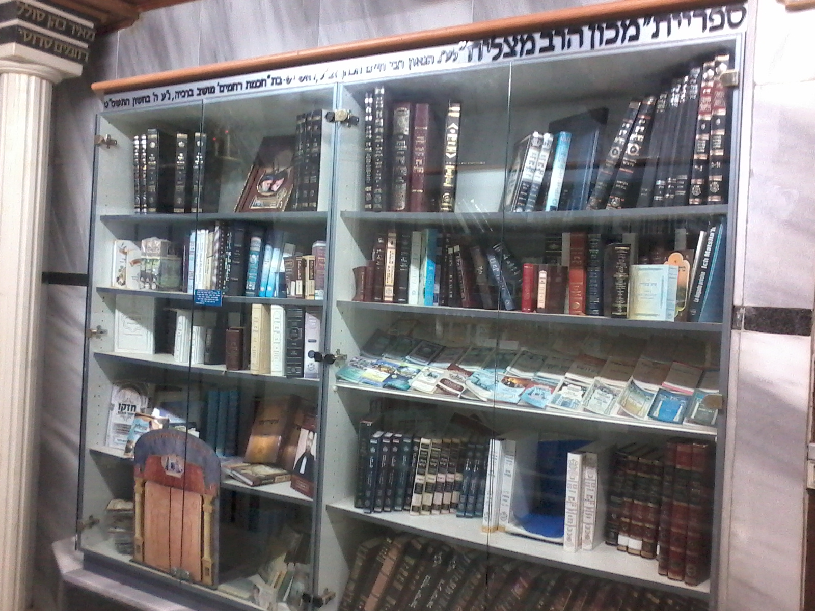 ספרים שיצאו לאור על ידי "מכון הרב מצליח" בבניין ישיבת כסא רחמים